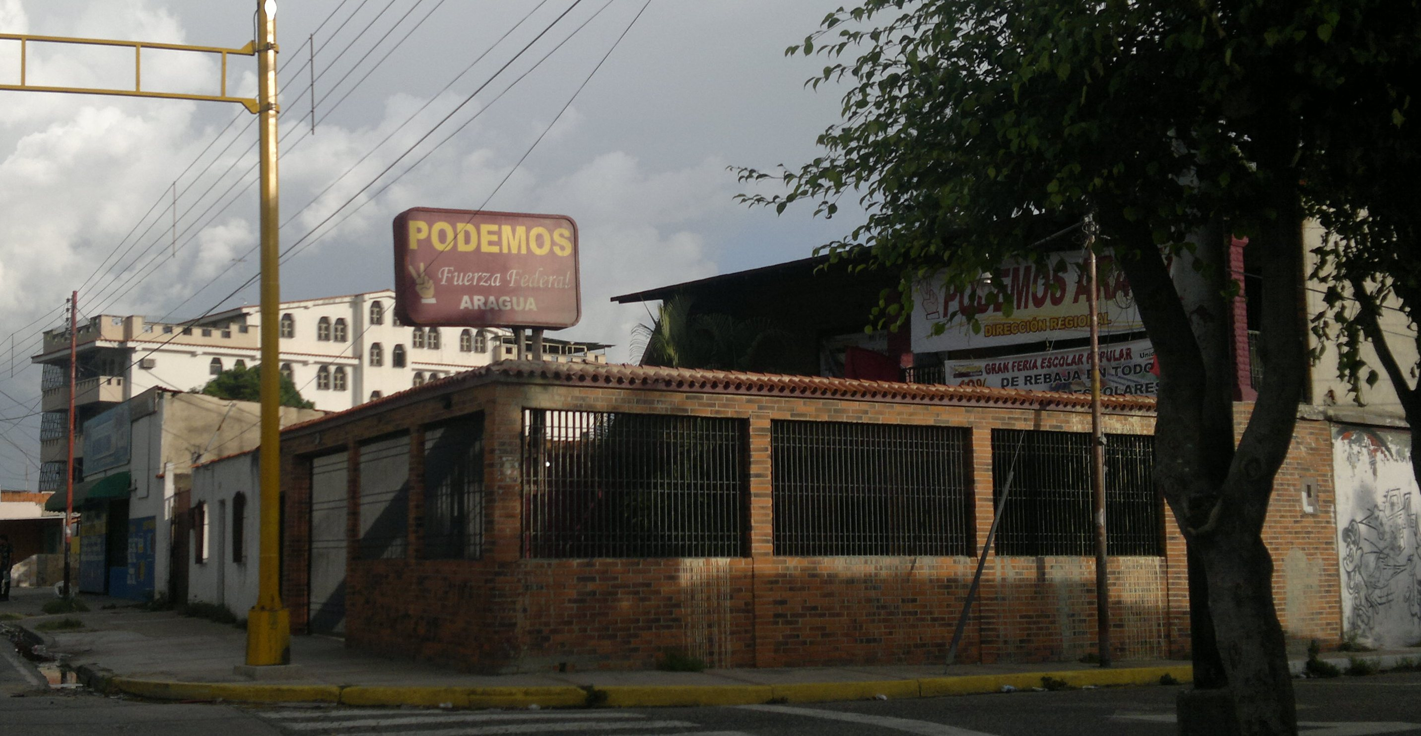 Casa del partido Podemos en Maracay, Aragua.